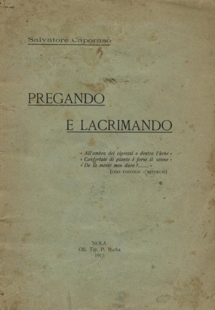 Copertina del libro "Pregando_e_lacrimando"